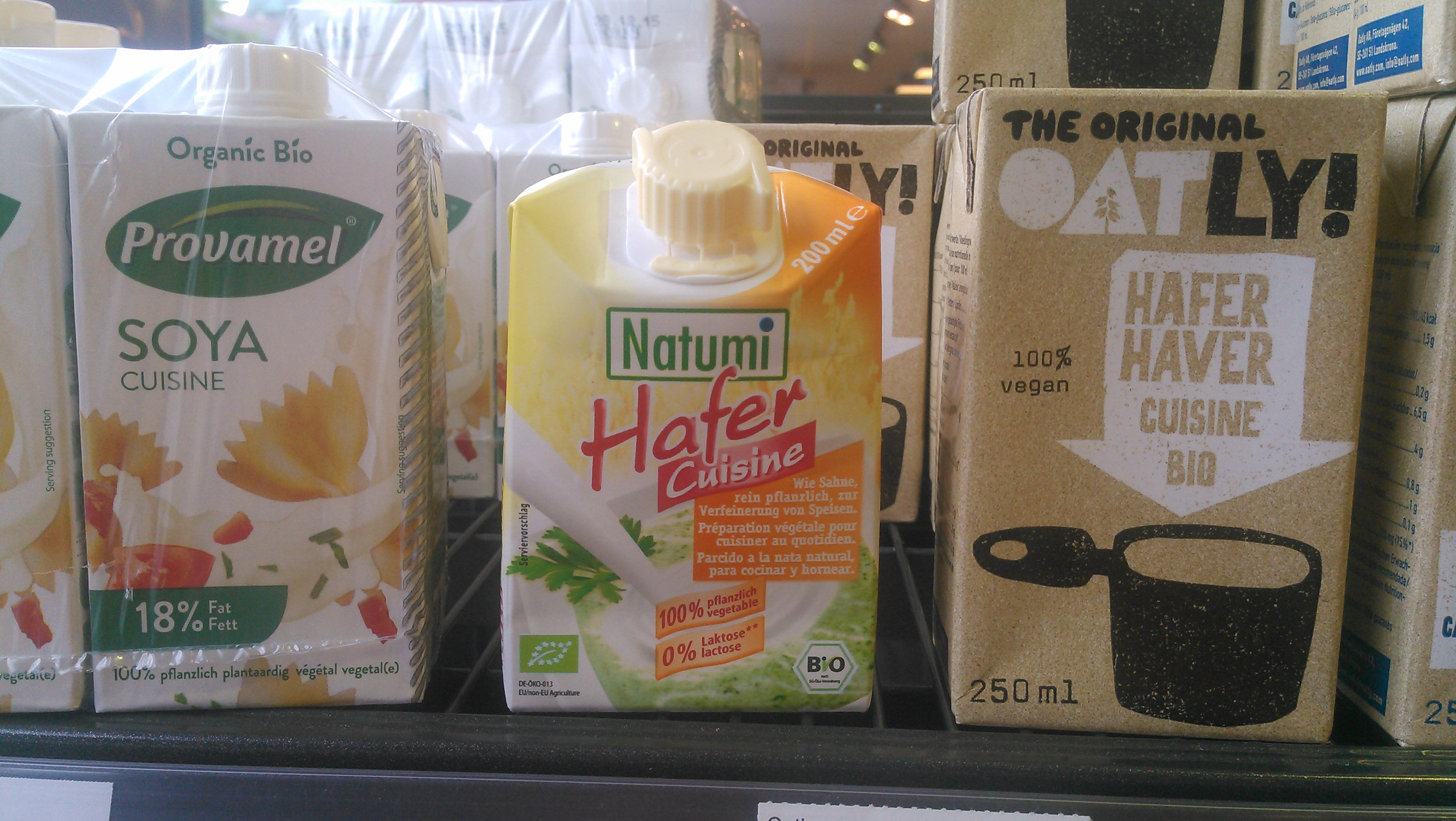 Drei verschiedene Pflanzensahnen aus dem Bio-Markt: Provamel Soya Cuisine, Natumi Hafer Cuisine, Oatly Hafer Cuisine.